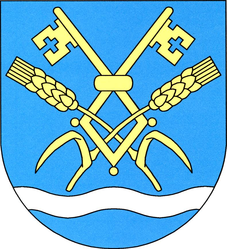 Znak obce Dvorce (okres Jihlava)